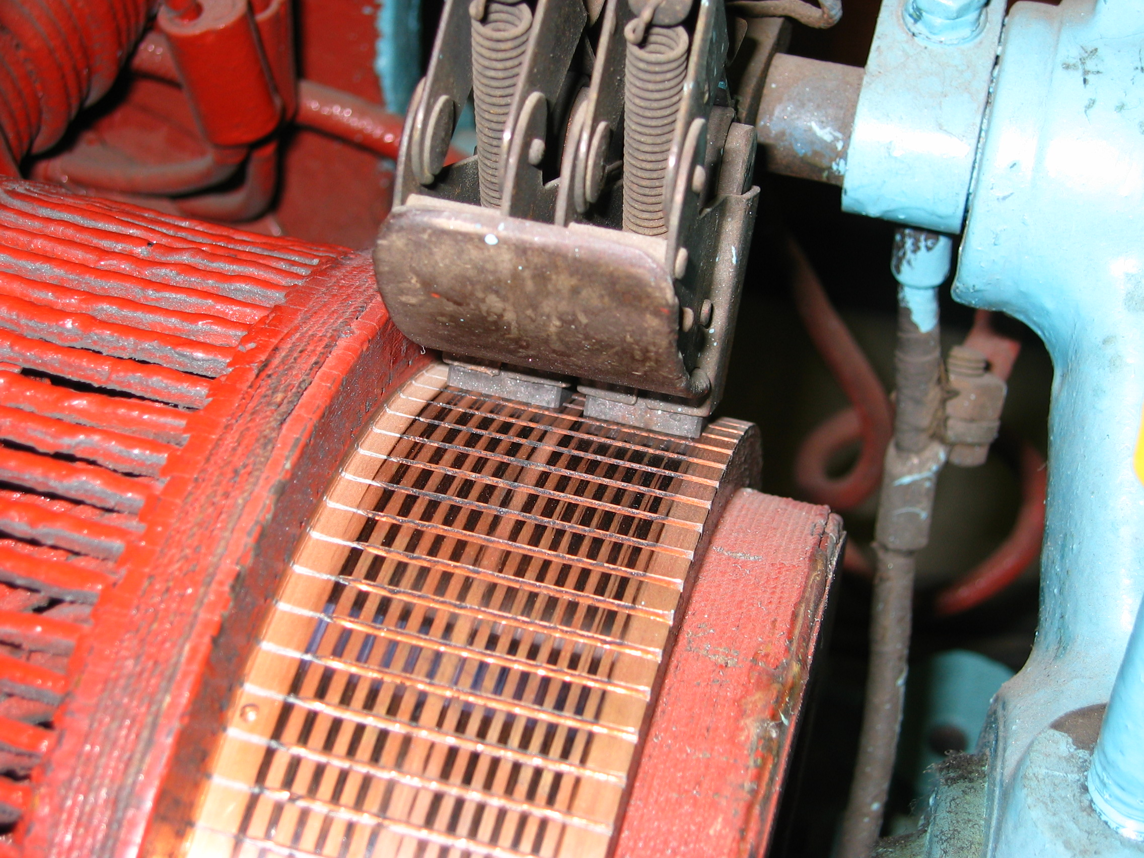 DC motor commutator and brushes Komutator silnika elektrycznego prądu stałego i przylegające do niego szczotki